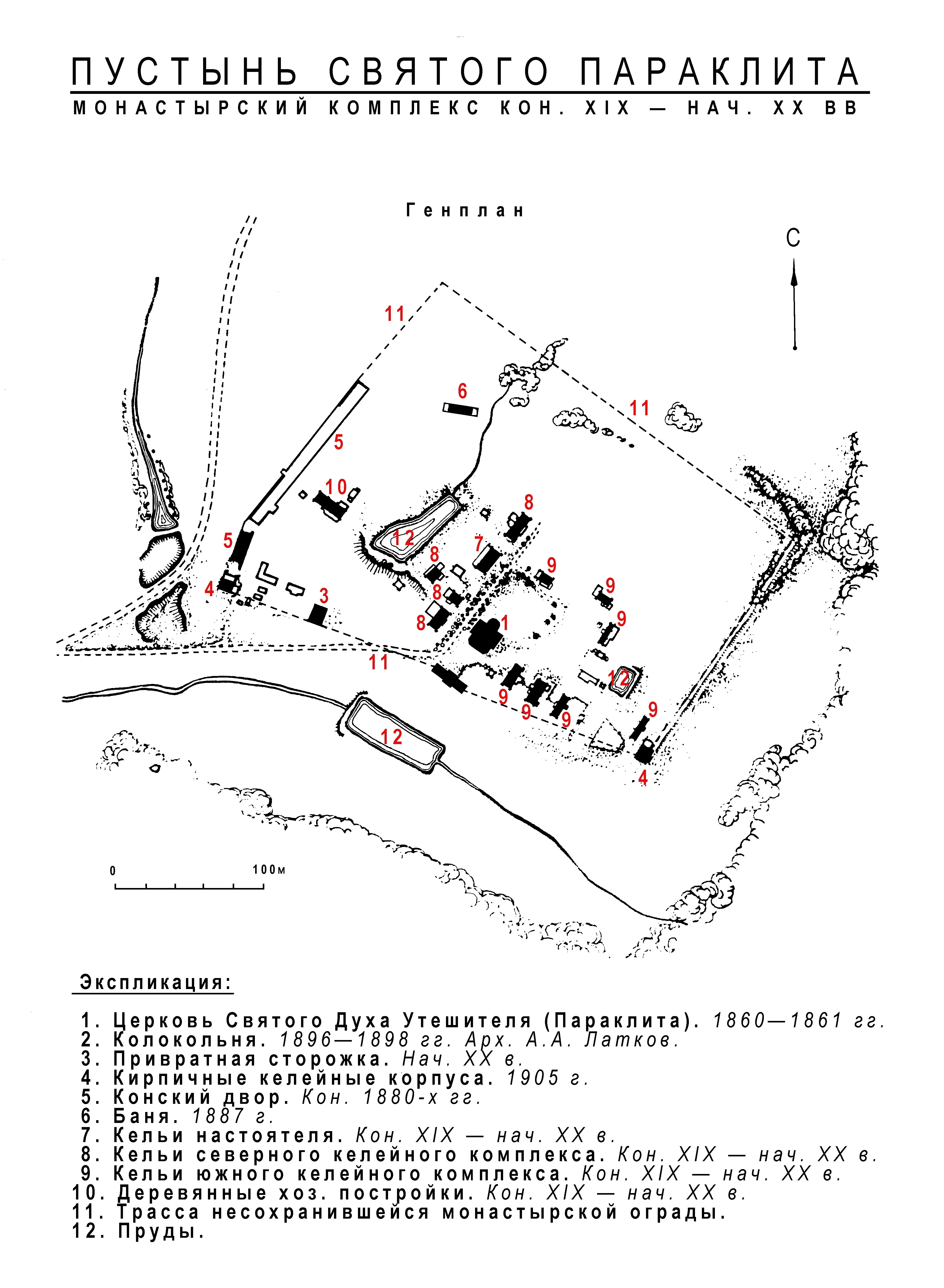 Пустынь Святого Параклита. Монастырский комплекс кон. XIX—нач. XX вв. Генплан